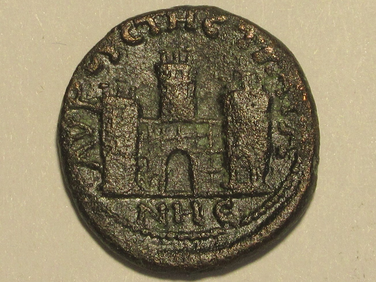 Stadttor von Augusta Traiana auf Münze z.Zt. Kaiser Septimius Severus, vgl. Varbanov 962